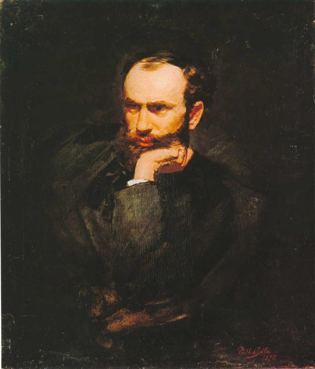 Mészöly Géza magyar festőművész.